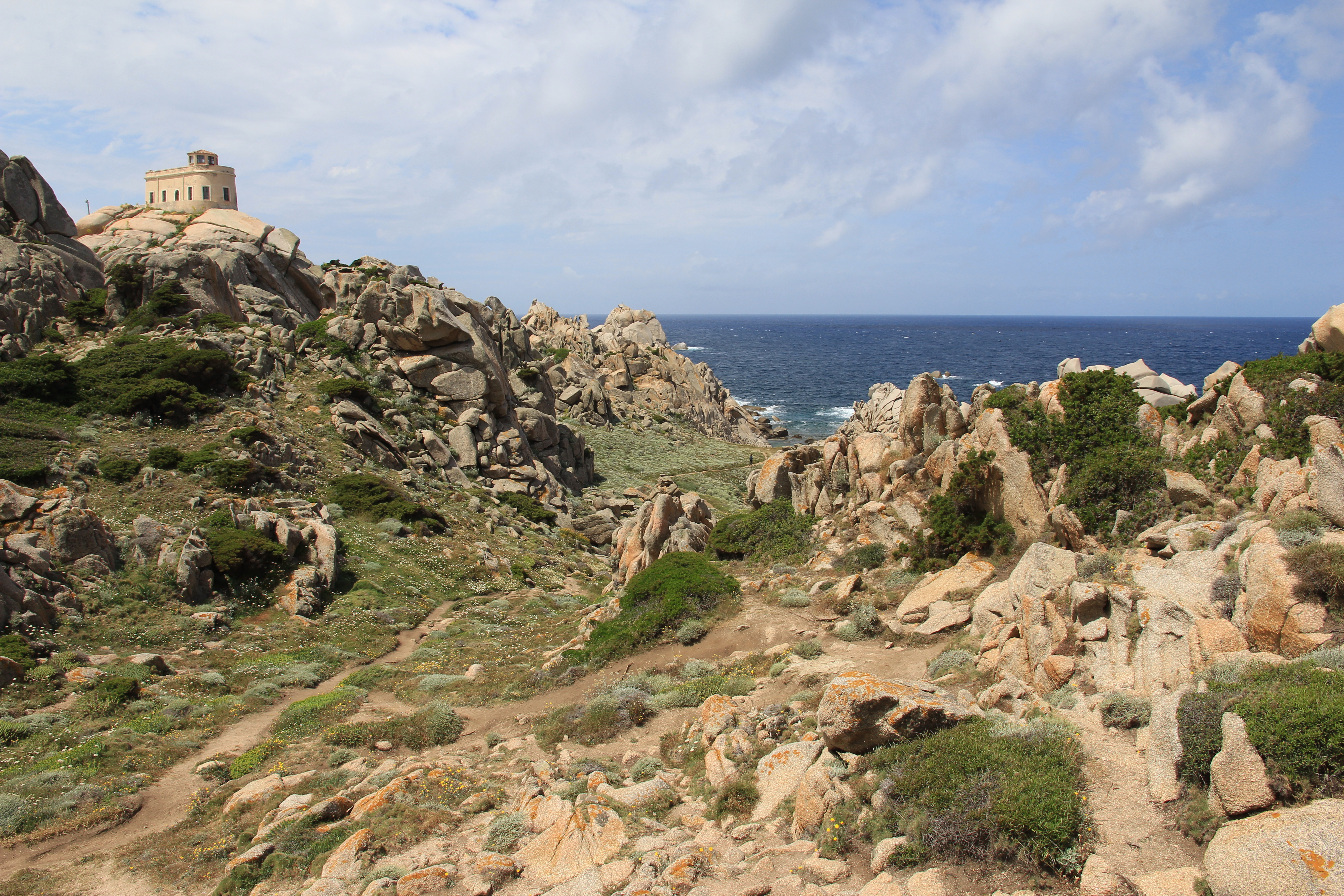 Capo Testa (Santa Teresa Gallura)